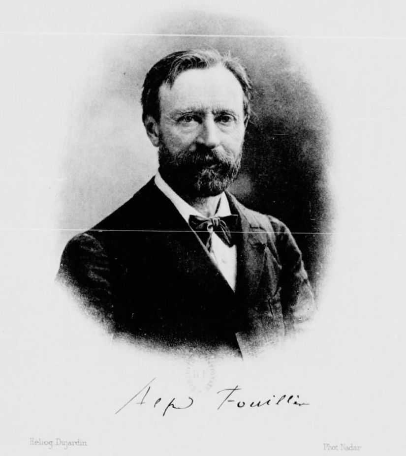 Portait d'Alfred Fouillée, par Nadar, gravure Heliog Dujardin.